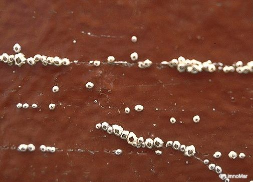 Seepocken auf silikonhaltiger Beschichtung, die sich in Kratzern durch mechanische Beschädigung ansiedeln konnten.